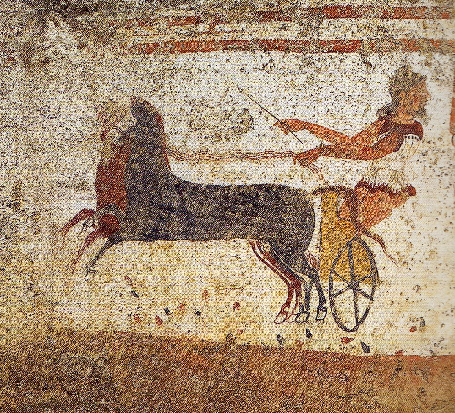 Paestum, Grab der Nereide. Detail